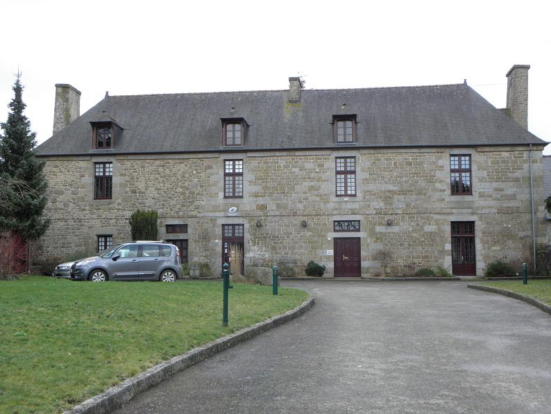 Mairie de Saint-Ouen-des-Alleux (35).